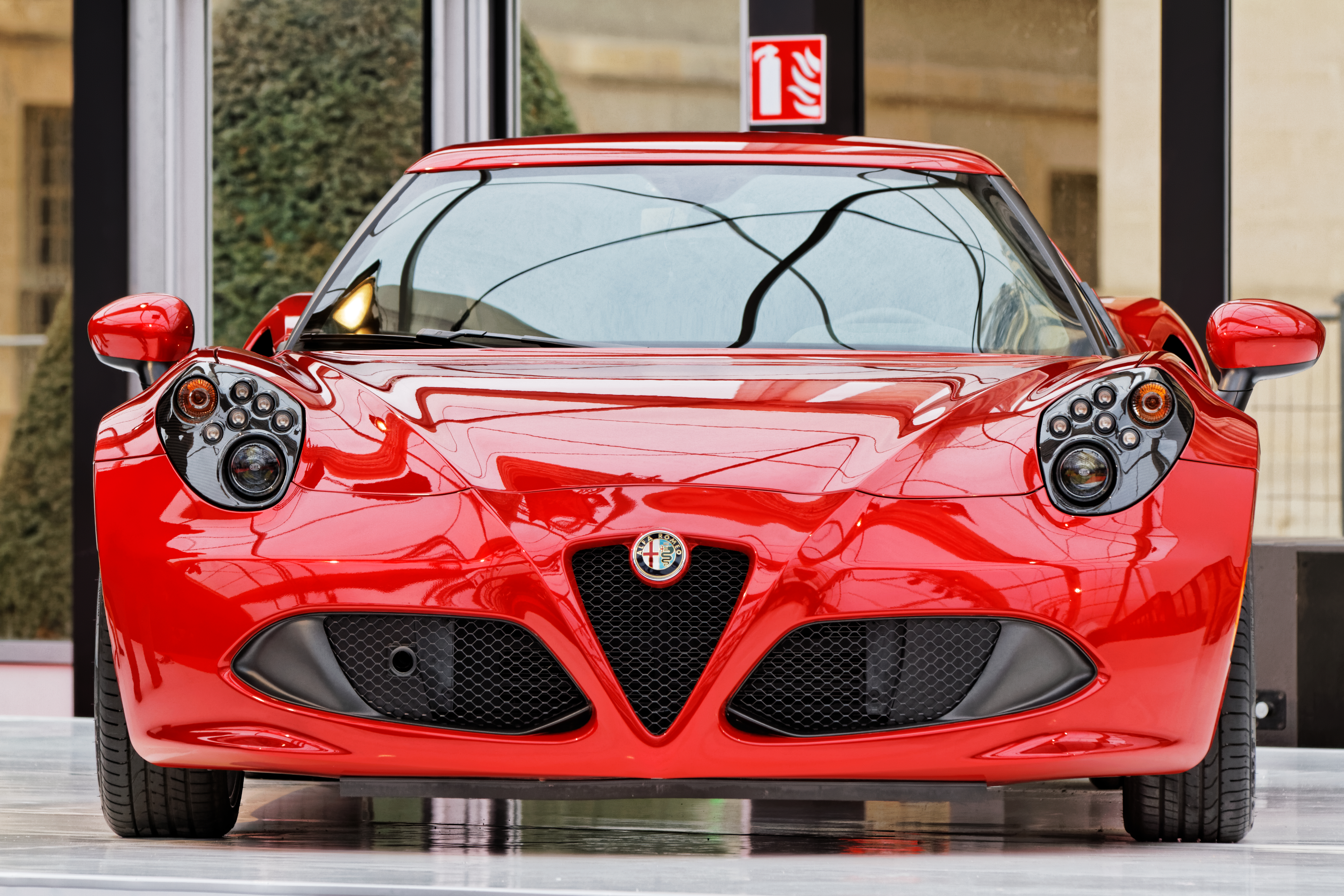 L'Alfa Romeo 4C exposée lors du festival automobile international 2014.